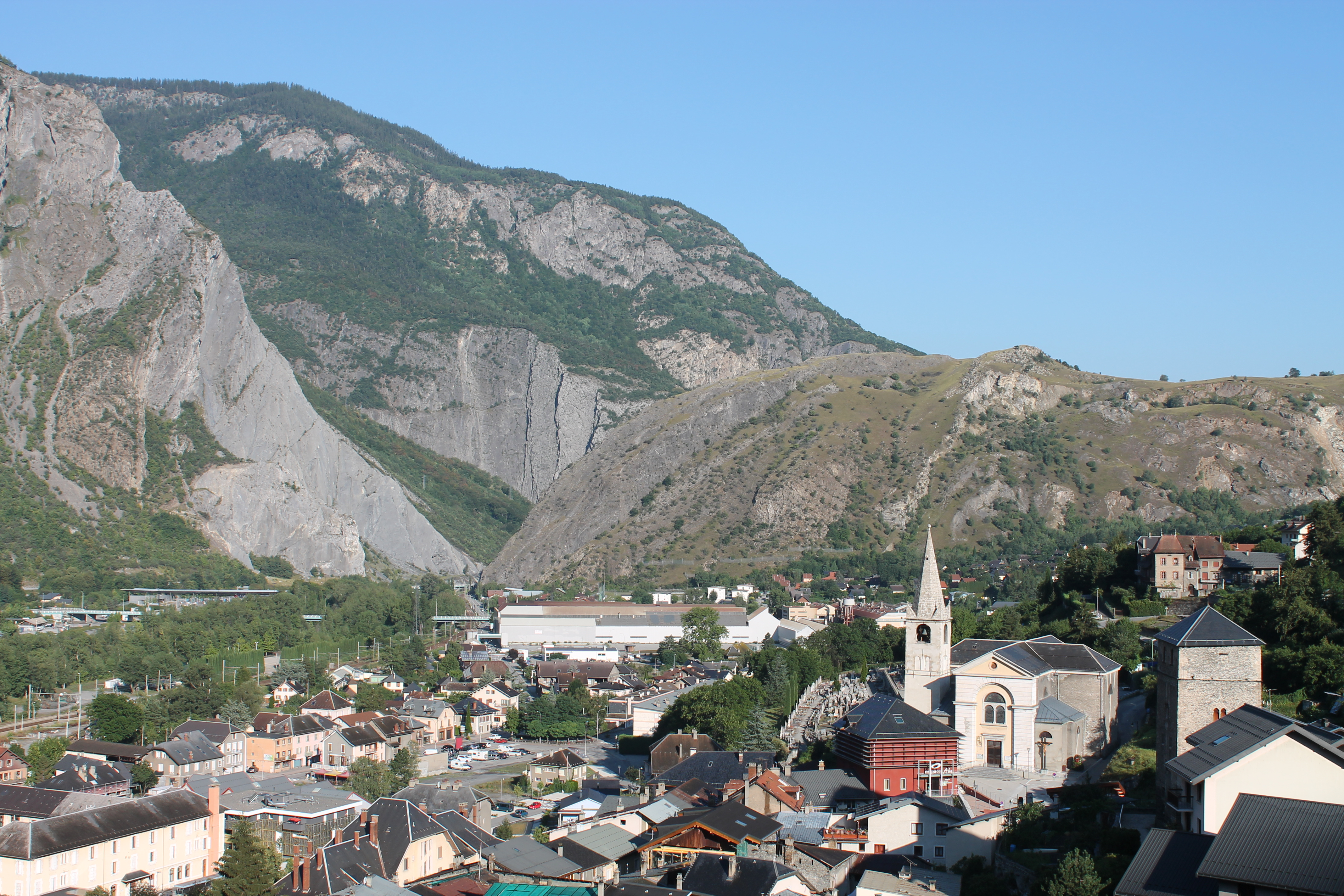 Vue de Saint-Michel-de-Maurienne et du vieux Bourg (Espace Alu, église Saint-Michel et tour carrée) depuis le plateau de Chambarlet (août 2018).